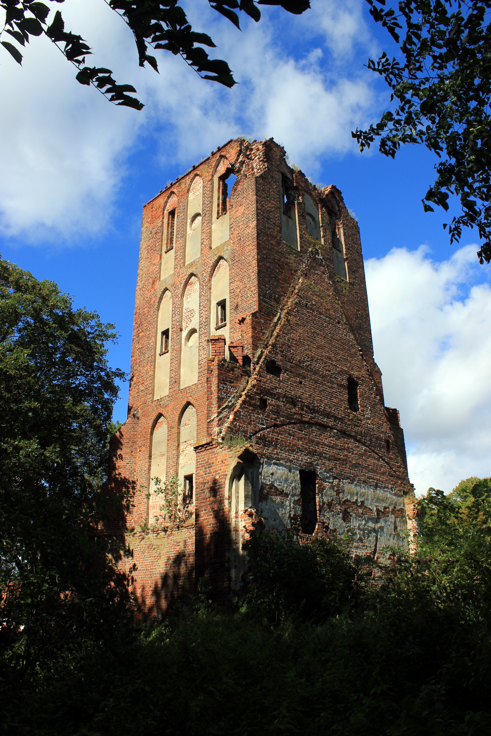 Ruine der Kirche in Brandenburg (Uschakowo), Oblast Kaliningrad, Russland.